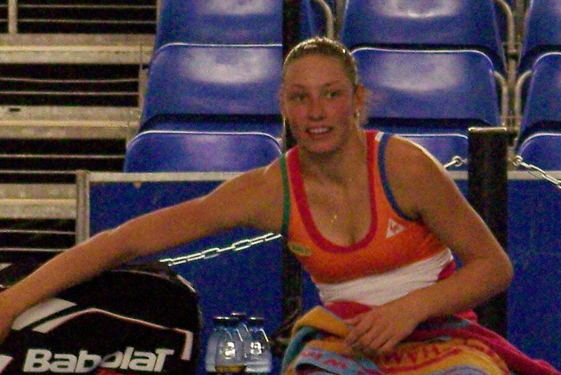 Yanina Wickmayer